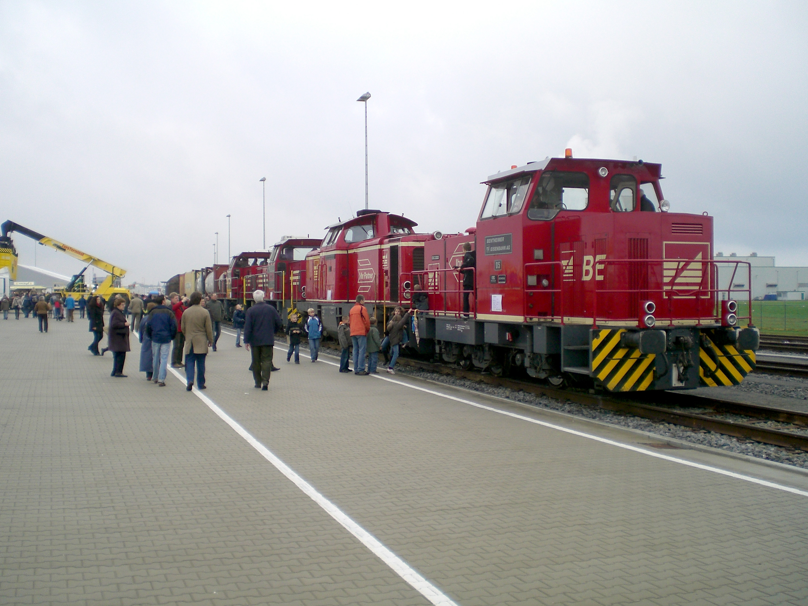 Lokomotiven der Bentheimer Eisenbahn am Euro-Terminal im Europark in Coevorden.